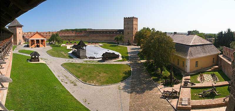 Панорама